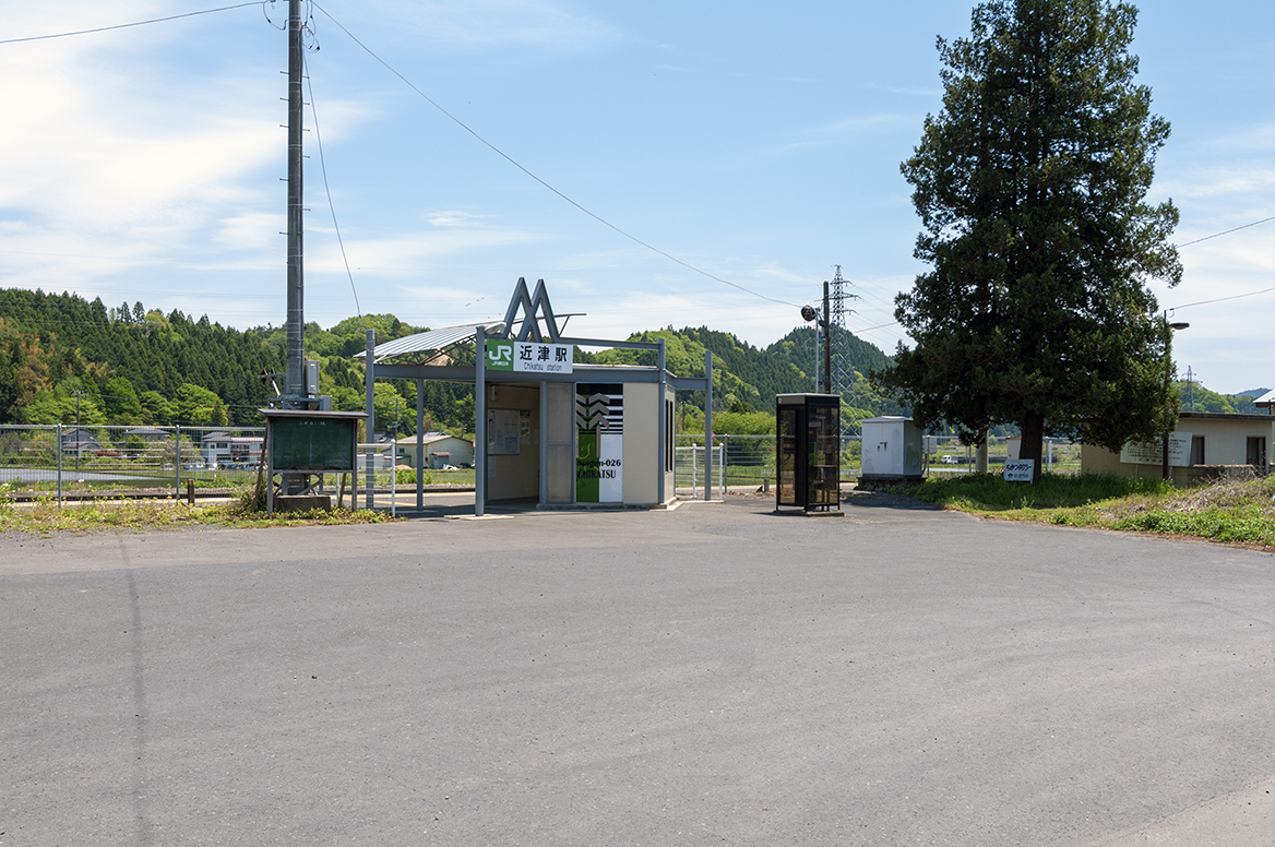 東日本旅客鉄道株式会社水郡線近津駅全景